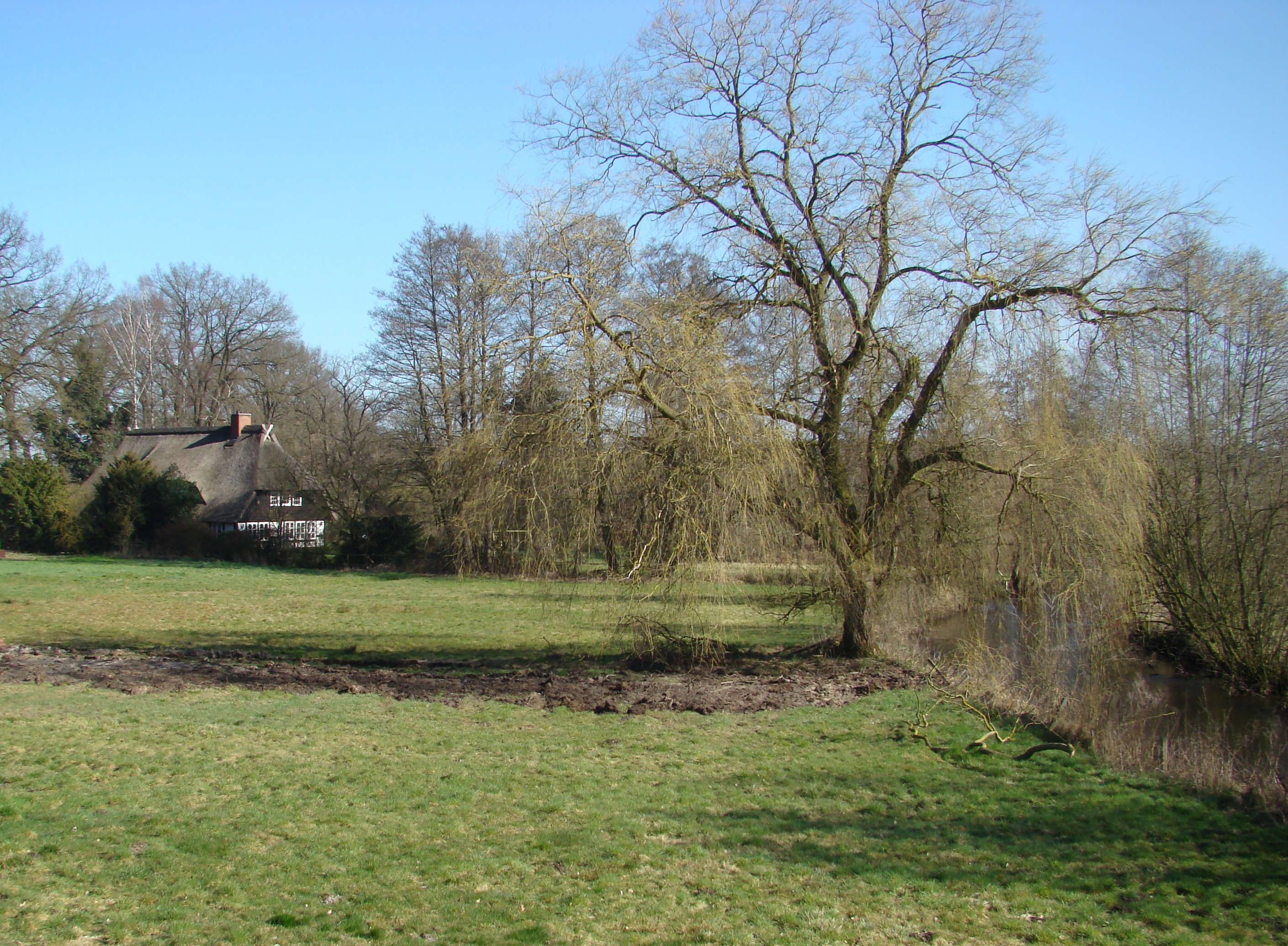 rietgedecktes Haus an der Örtze in Oldendorf